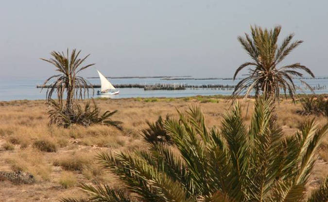 paysage de Kerkennah, photographie personnelle prise l'été à 2,5 kilomètres au nord de l'embarcadère de Sidi Youssef, île Chergui. Au premier plan : la steppe parsemée de palmiers, au second plan : la mer avec le passage d'un bateau de pêche typique, une flouka, ou petite felouque, s'apprêtant à croiser une pêcherie.